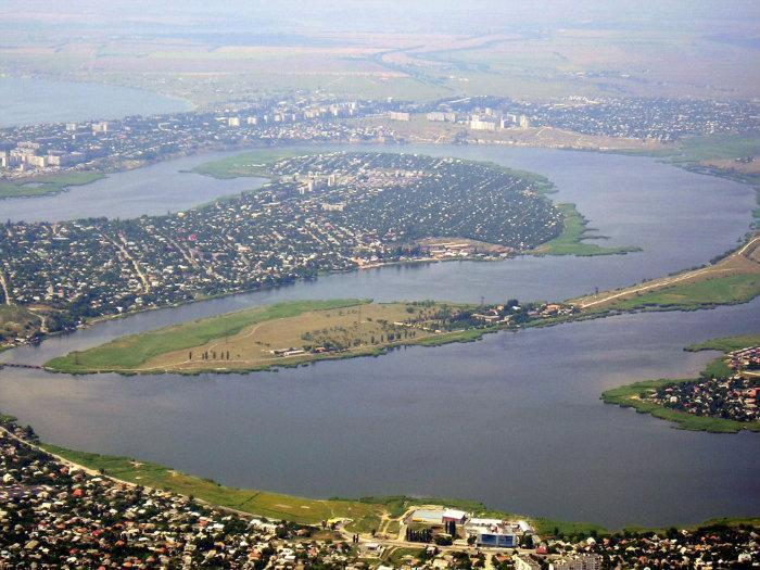 На передньому плані - Старий Водопій, за ним - півострів Аляуди, далі півострів Ракетне Урочище. На іншому березі (зліва направо) - Соляні, Північний, Тернівка.